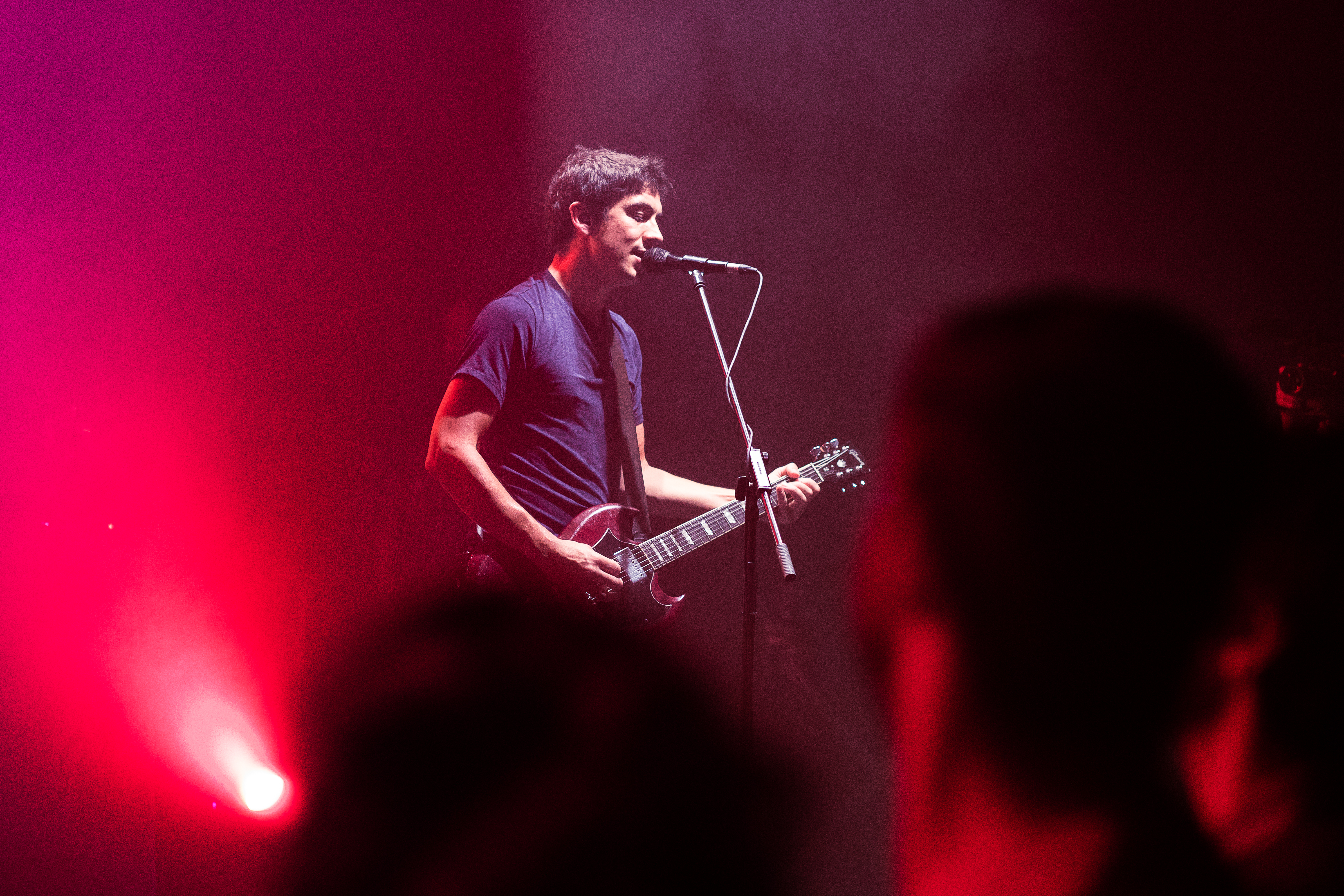 Dkluba Intxaurrondo 2018/10/13 Argazkilaria/Fotógrafo: Josu de la Calle